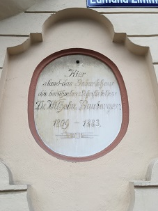 Tafel von Wilhelm Bauberger auf der Straßenseite am Baubergerhaus in Thannhausen (Schwaben)